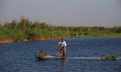 lago mareótis do egito